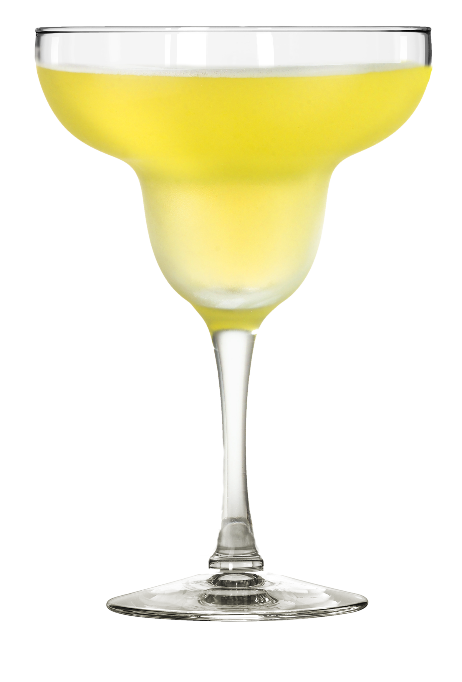 International Cocktail Barracuda